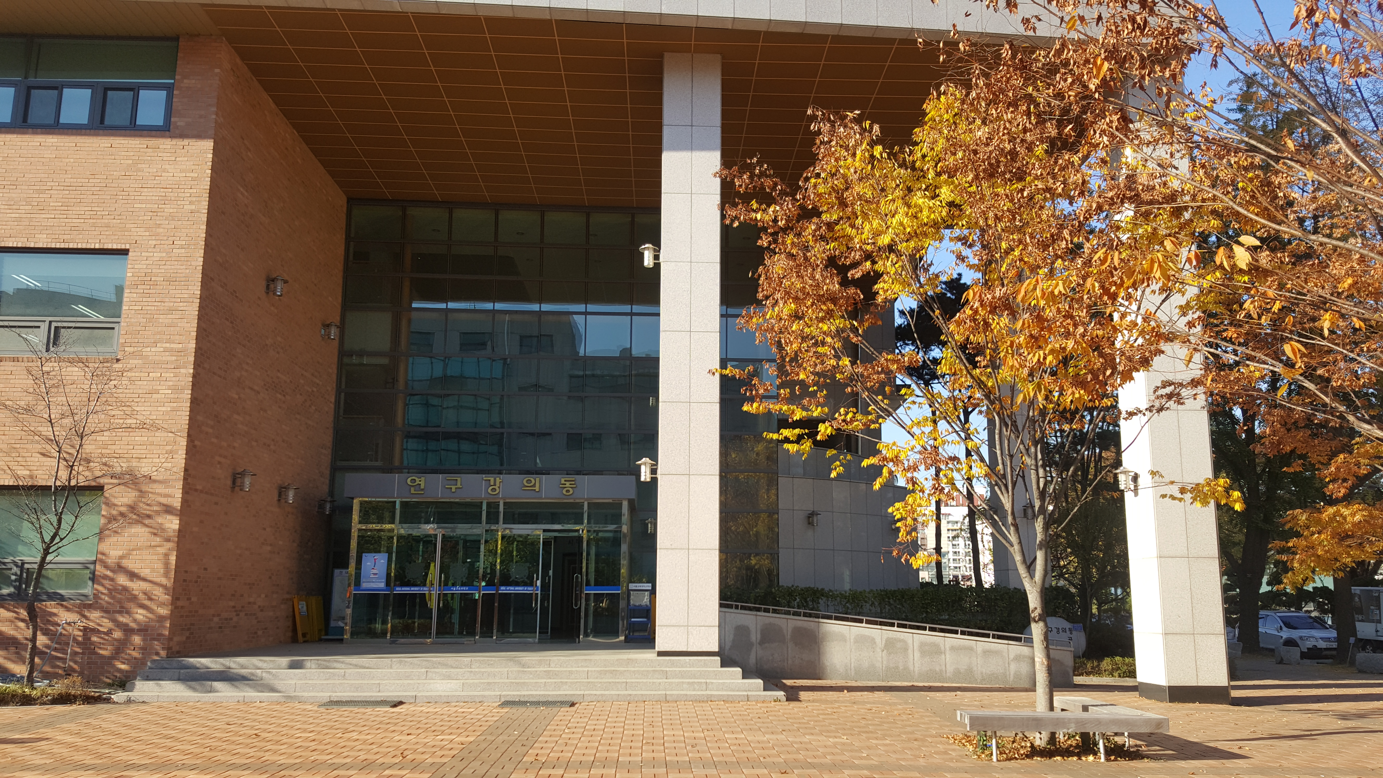 조선말: 연구강의동